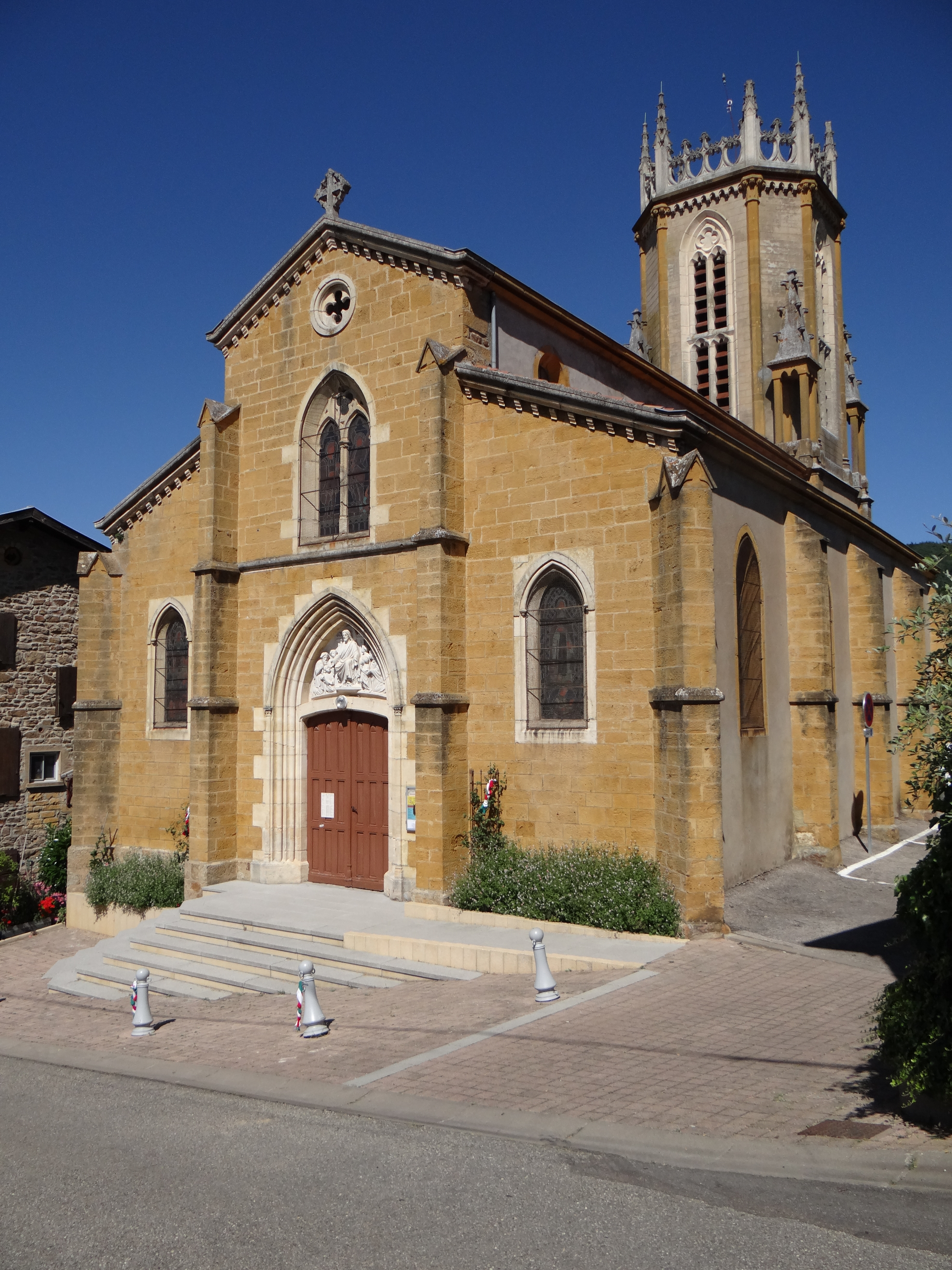 Église Saint-Georges, Chevinay, Rhônes, France.